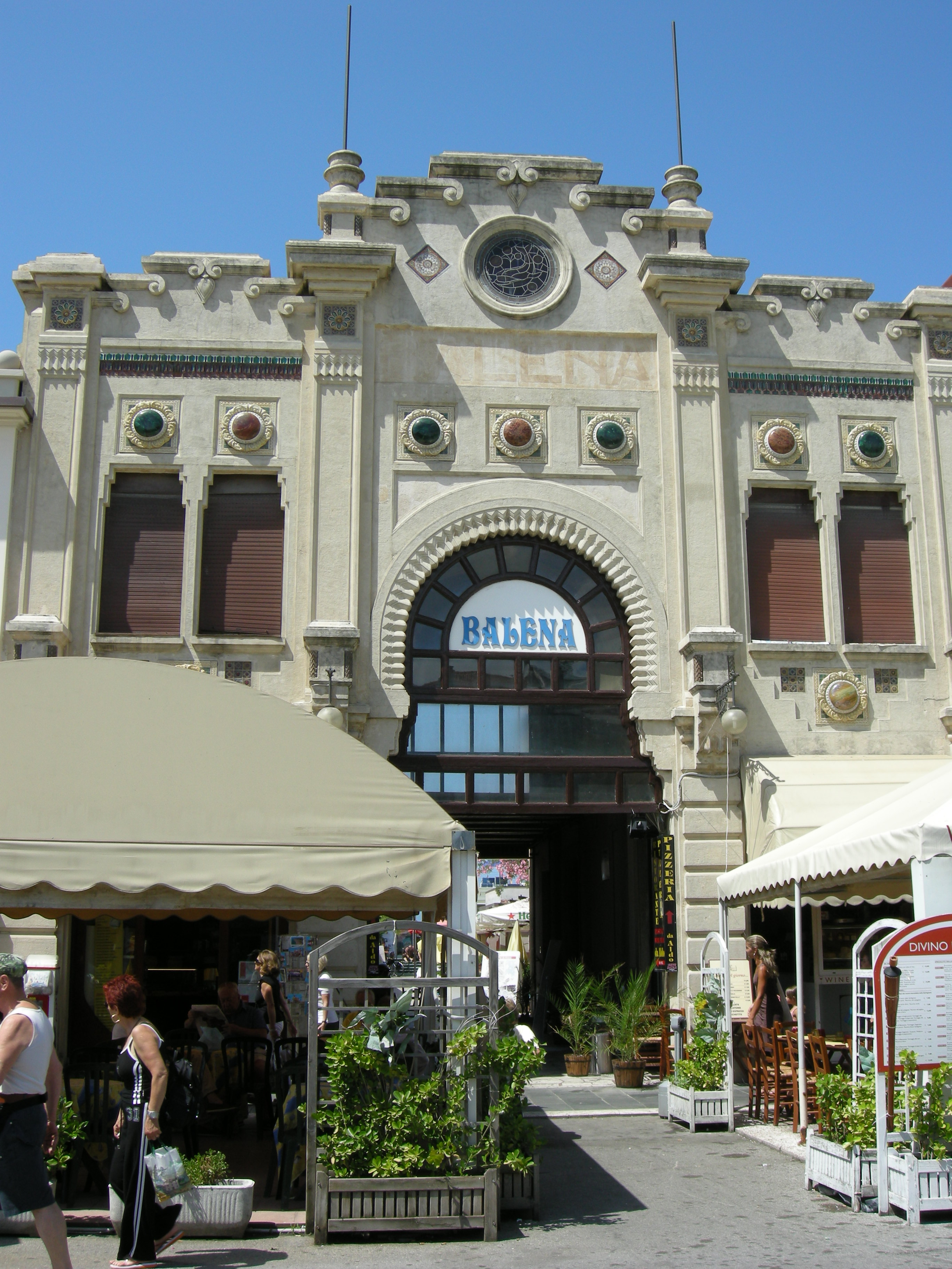 Passeggiata di viareggio 09 bagno balena